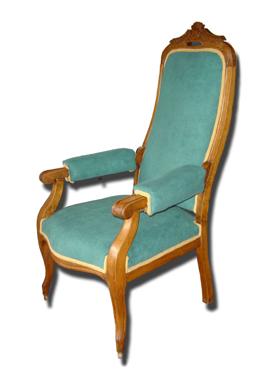 Fauteuil Voltaire, à mécanisme accotoirs à manchette. Photographer Isabelle Grosjean ZA Date 2006-08-23 License GNU FDL Camera Sony PSC-P92